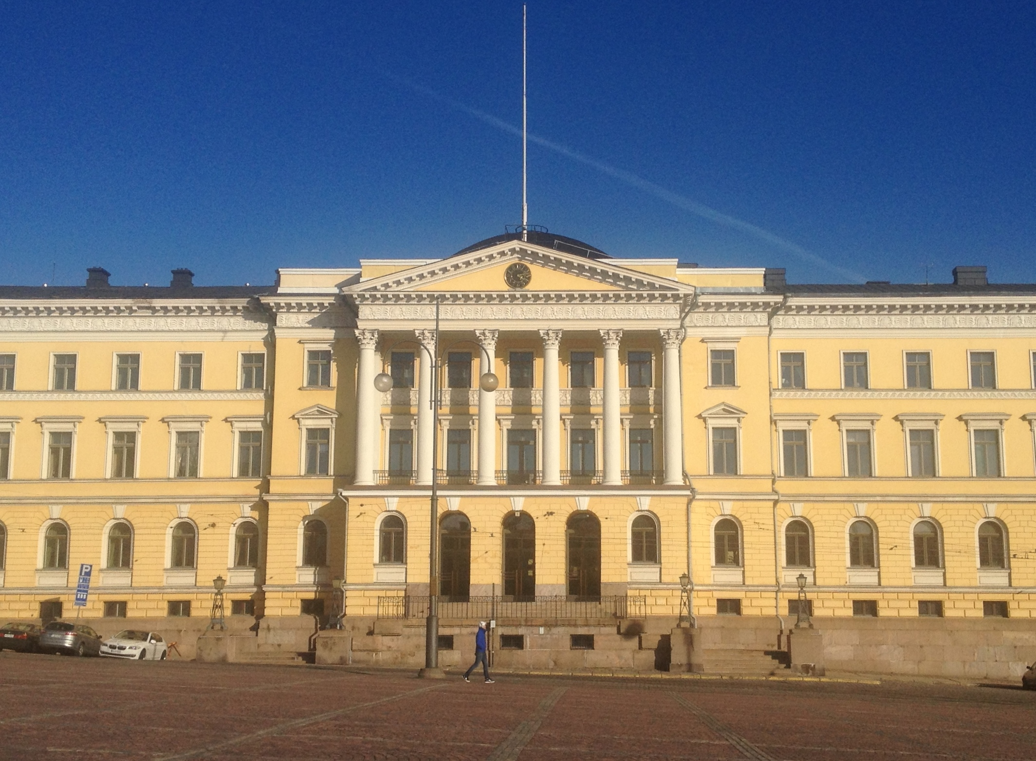 Helsingin yliopiston keskustakampus 28. syyskuuta 2014 3 This is a photo of a monument in Finland identified by the ID 'City Centre Campus' (Q4348801) - RKY: 4633 This is a photo of a monument in Finland identified by the ID 'buildings of the University of Helsinki' (Q30506309) - RKY: 4633